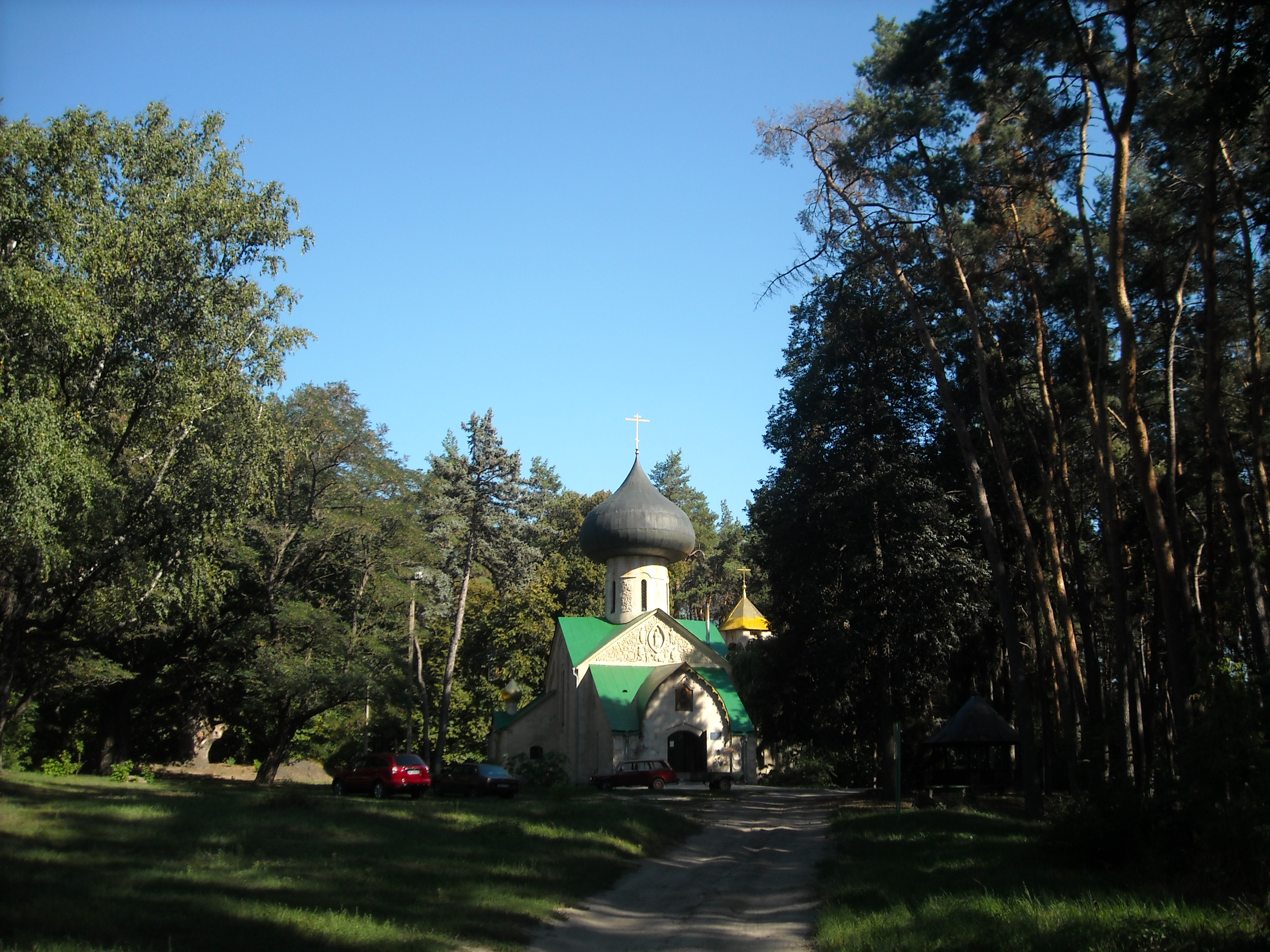 Україна. Харківська область.Краснокутський район.Наталіївка. Спаський храм. 2013